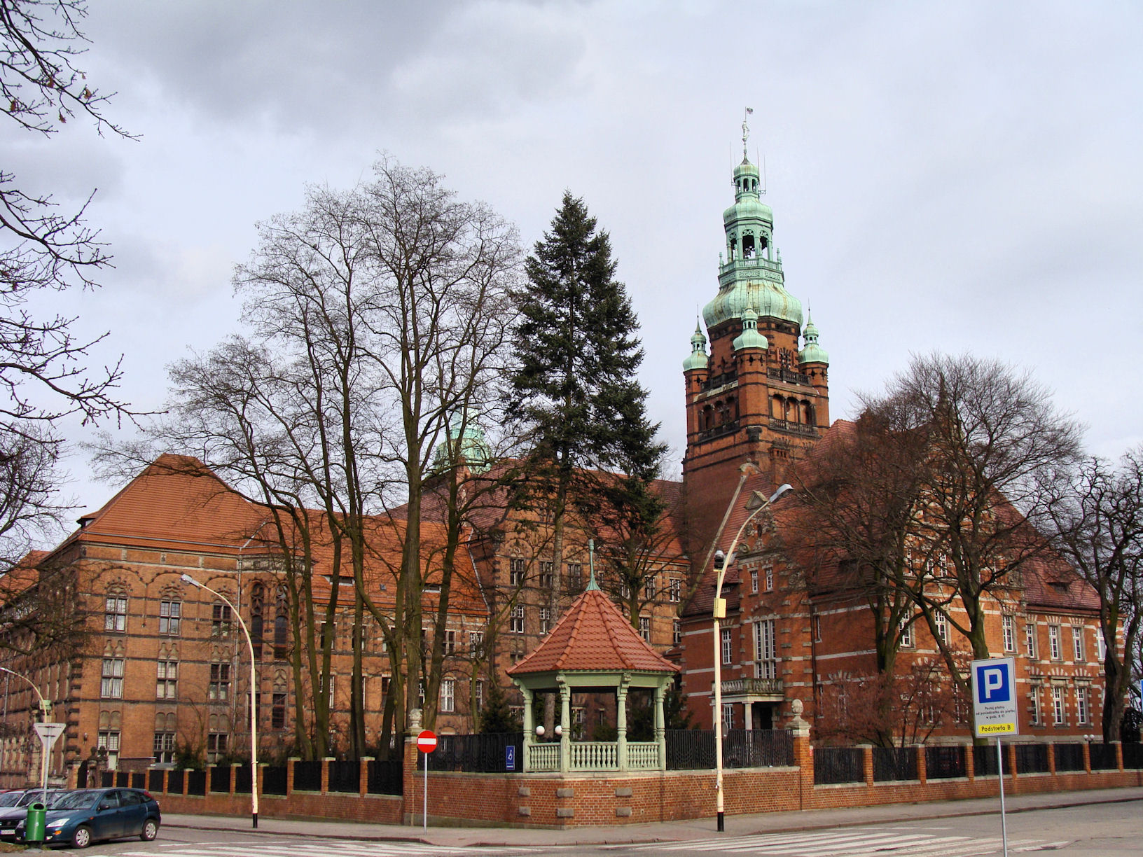 Zachodniopomorski Urząd Wojewódzki w Szczecinie